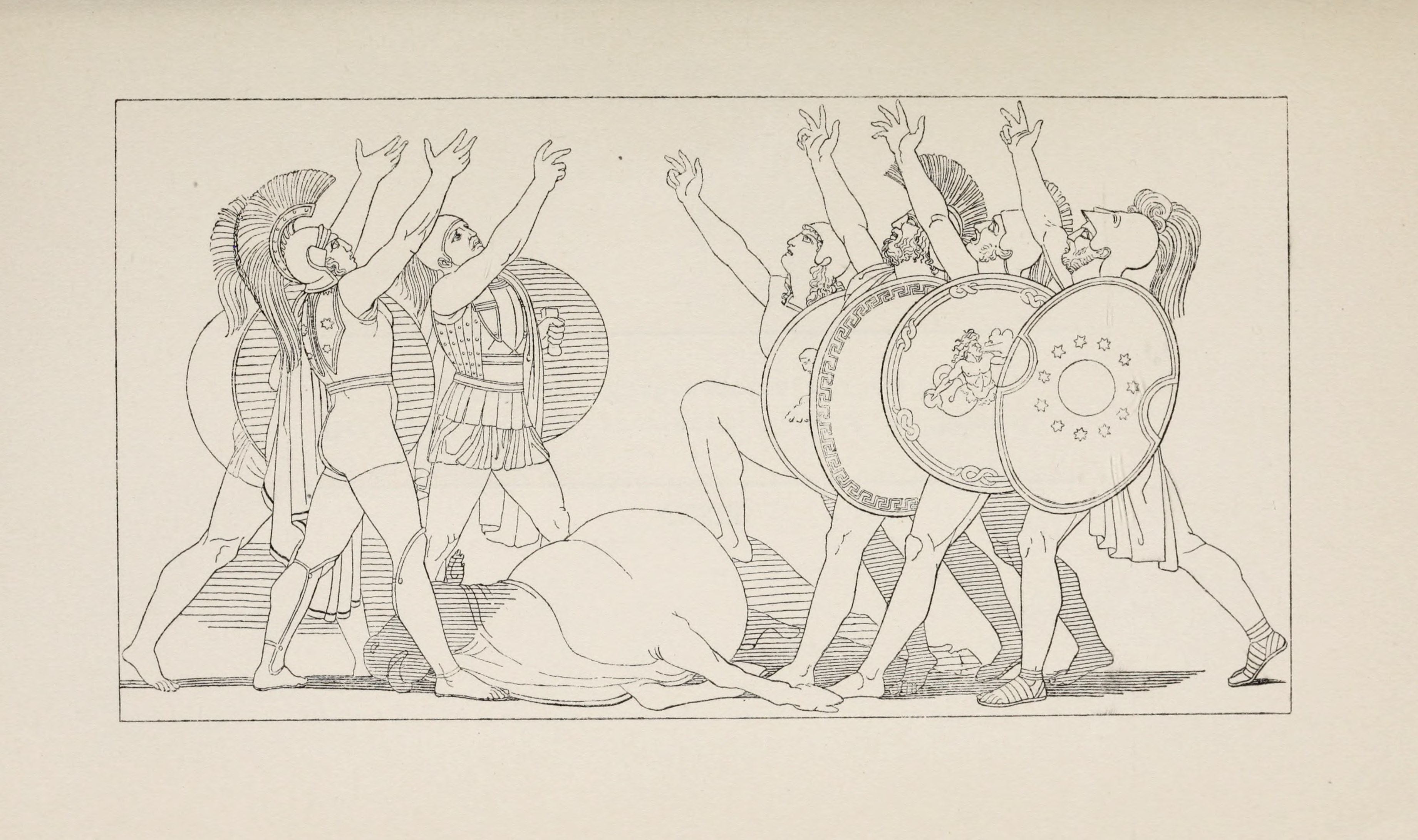 Die sieben Fürsten, Theben den Untergang schwörend (von links nach rechts: Adrastos, Polyneikes, Kapaneus, Parthenopaios, Amphiaraos, Hippomedon, Tydeus). – Äschylos, Die Sieben gegen Theben V. 42.